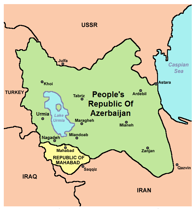 Die Autonome Republik Aserbaidschan (hellgrün) im Norden des Irans. Südwestlich davon die Republik Mahabad (hellgelb)